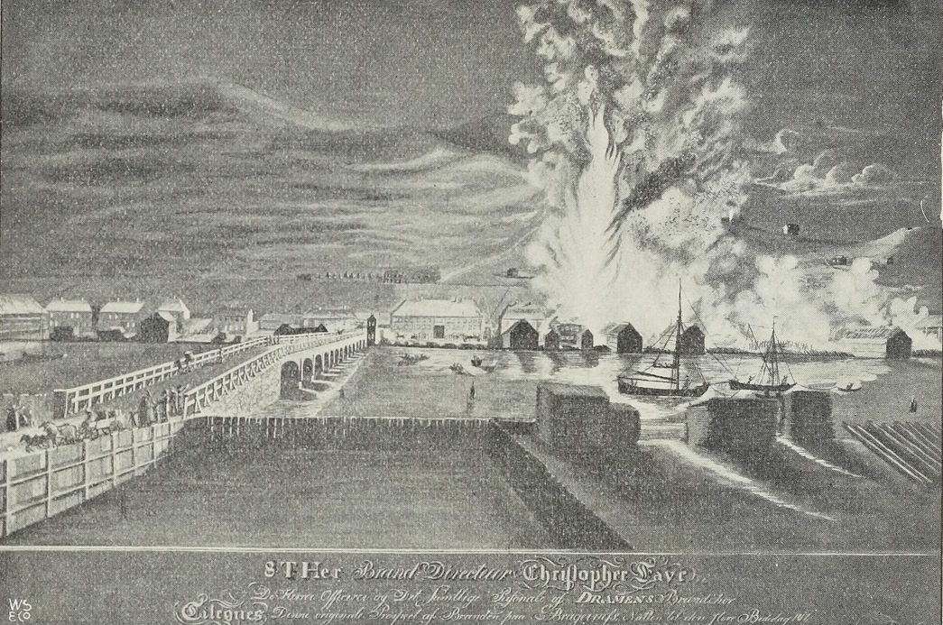 Brannen på Bragernes sett fra Strømsø. Fra Tor Pedersen: «Drammen 1811–1911» (Harald Lyche, 1911), s. 83.